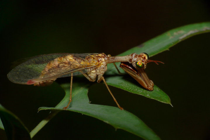 Mantispe